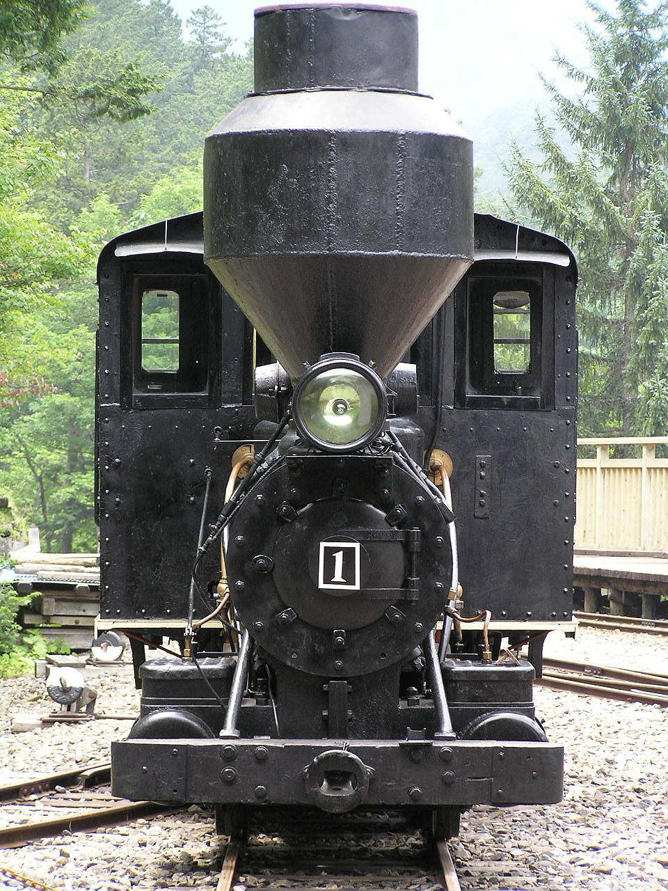 ボールドウィン1号機 赤沢自然休養林